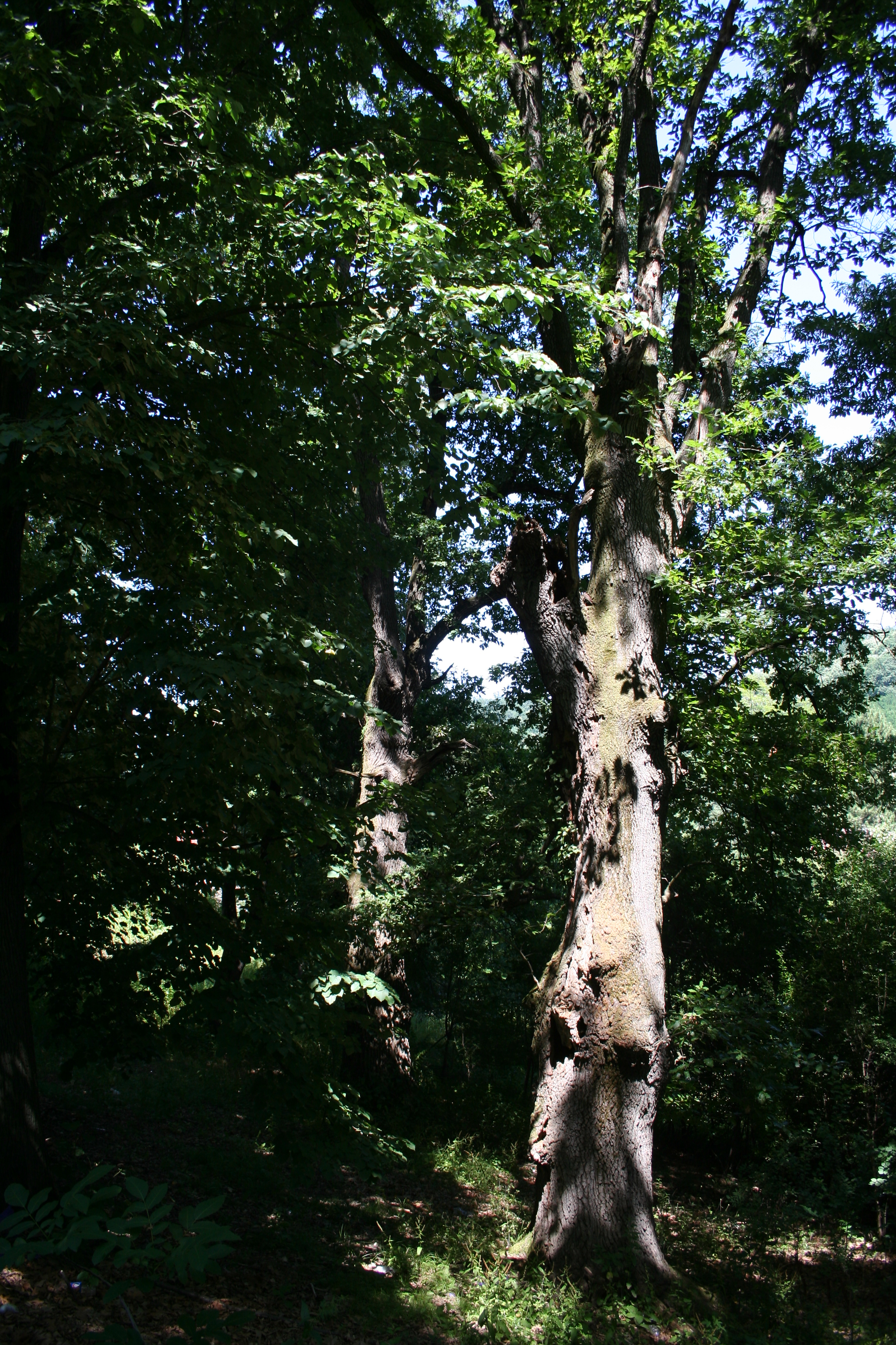 Odmaralište BEKO (podignuta iz fonda kraljice Marije 1940. godine)